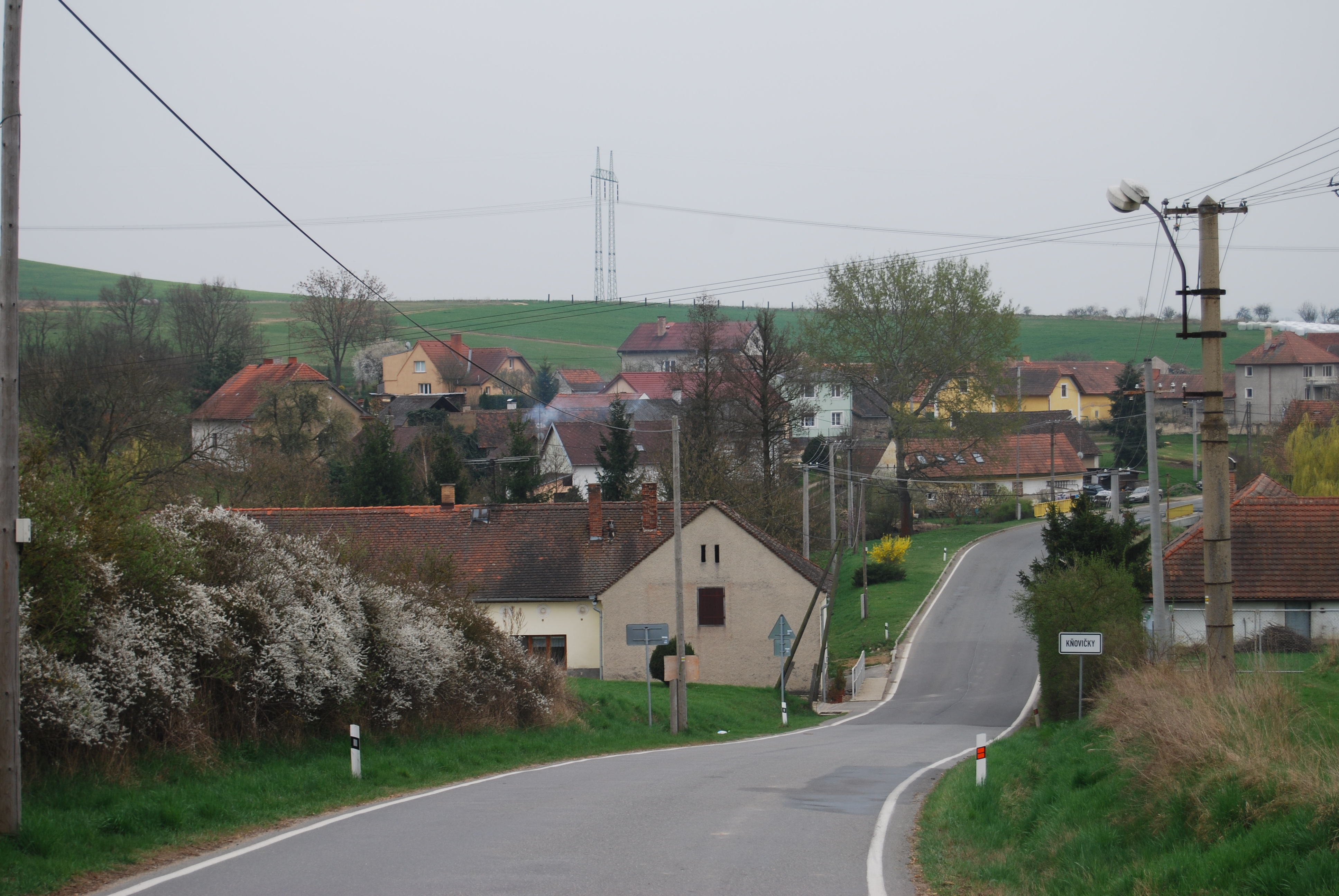 Pohled na část vesnice. Kňovičky - část obce Kňovice v okrese Příbram. Česká republika.